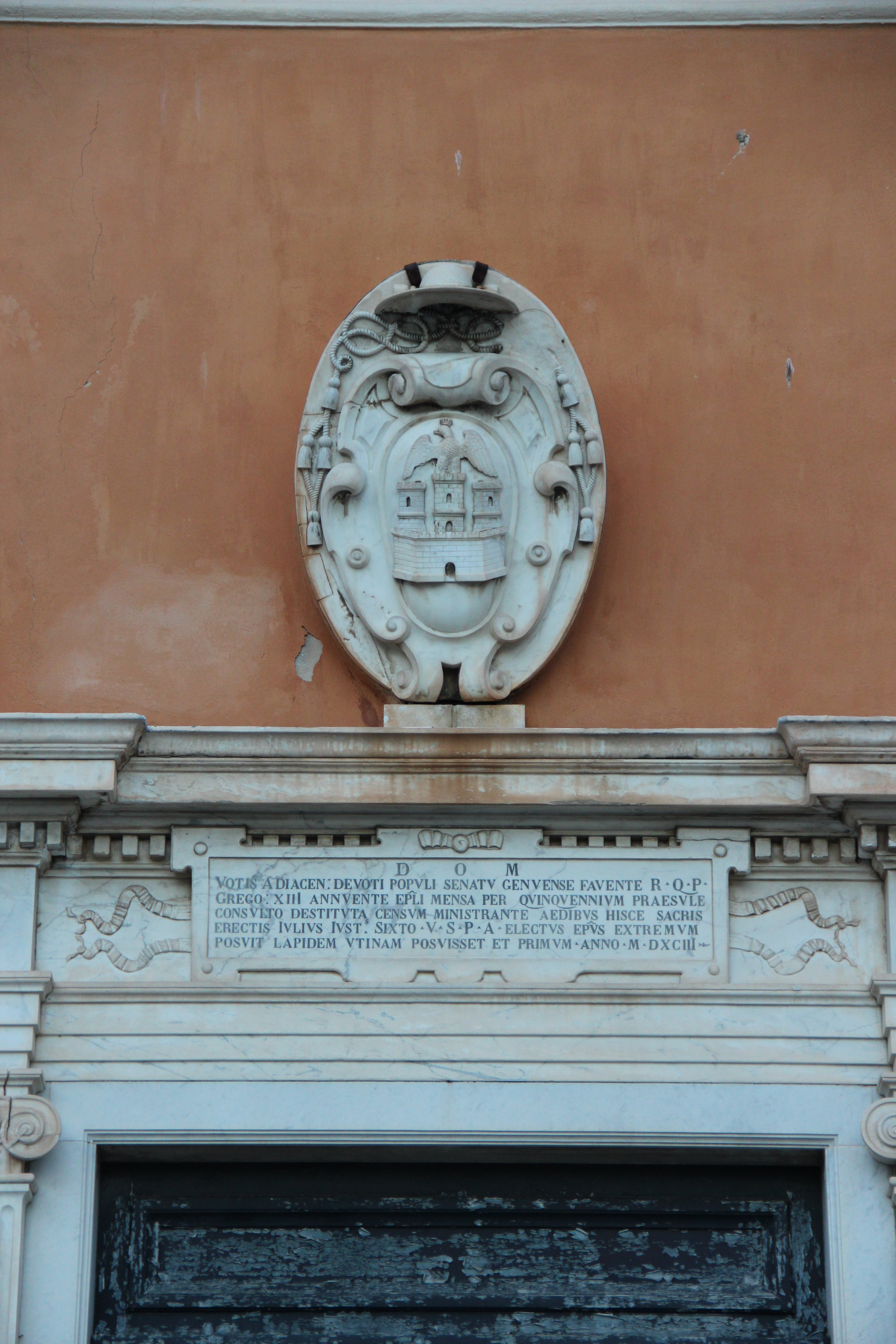 Cathédrale Notre-Dame-de-l'Assomption d'Ajaccio